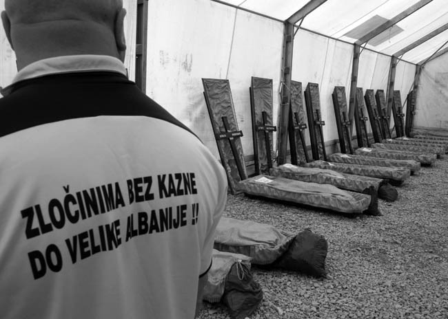 Преузимање посмртних остатака Срба убијених 1998. године Фотографије Косова и Метохије из пројекта "Корени душе" Фото:Дарко Дозет